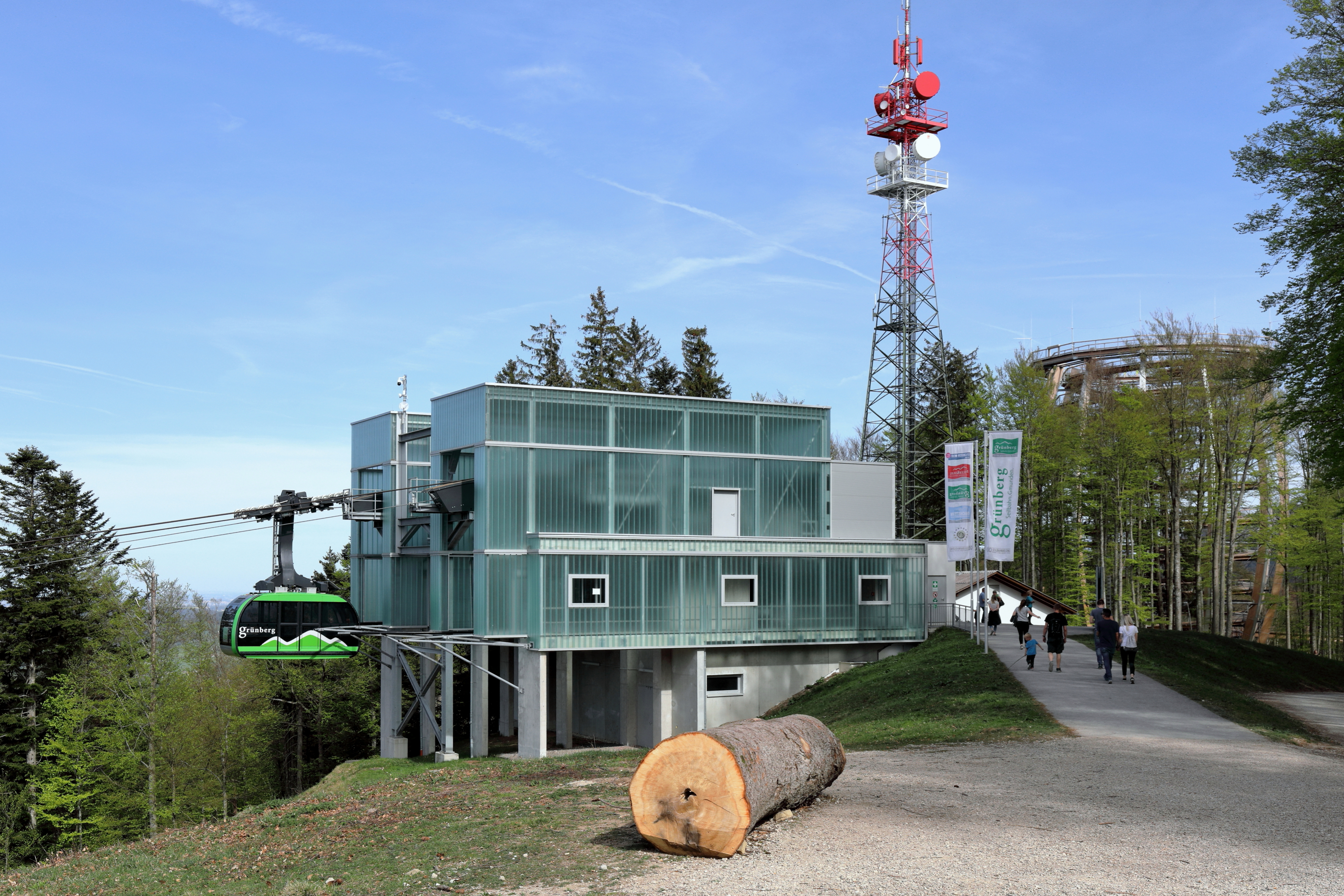 Im Vordergrund die Bergstation der Grünbergseilbahn auf dem 984 m hohen Hausberg der Gmundner in der oberösterreichischen Stadtgemeinde Gmunden und rechts hinten ein Sender sowie der 2018 errichtete Aussichtsturm.